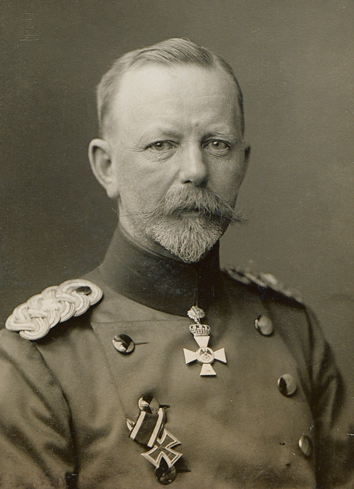 Bildnis Friedrich Sixt von Armin